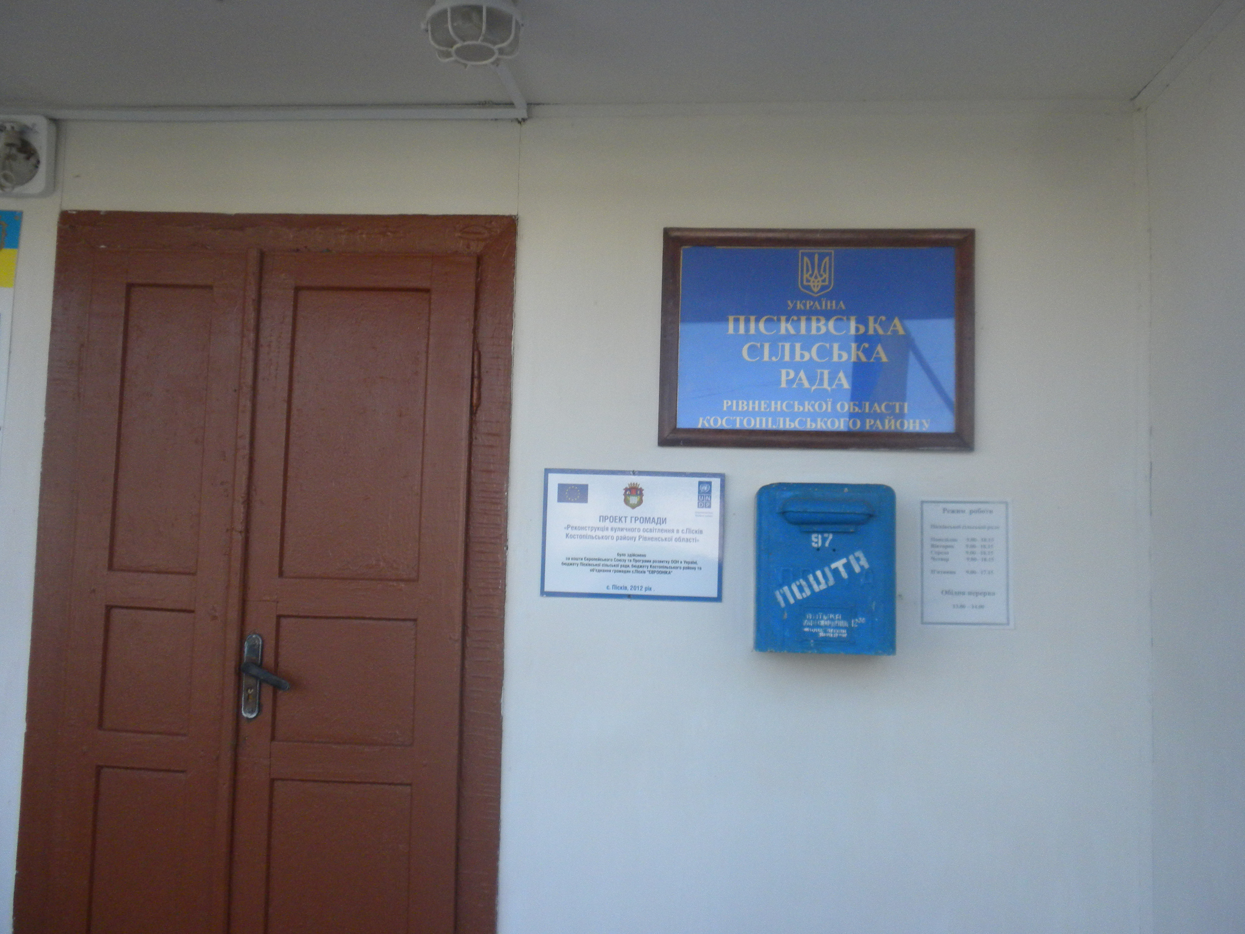 Пісківська сільська рада